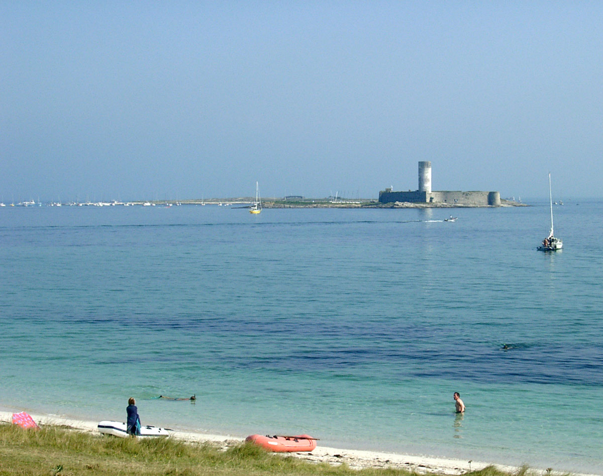 Description : Fort Cigogne vu de l'ile du Loch dans l'archipel des Glénans (France) Lieu : Archipel des Glénans / Finistère / France Date : 2001 Auteur : Pline Photo personnelle